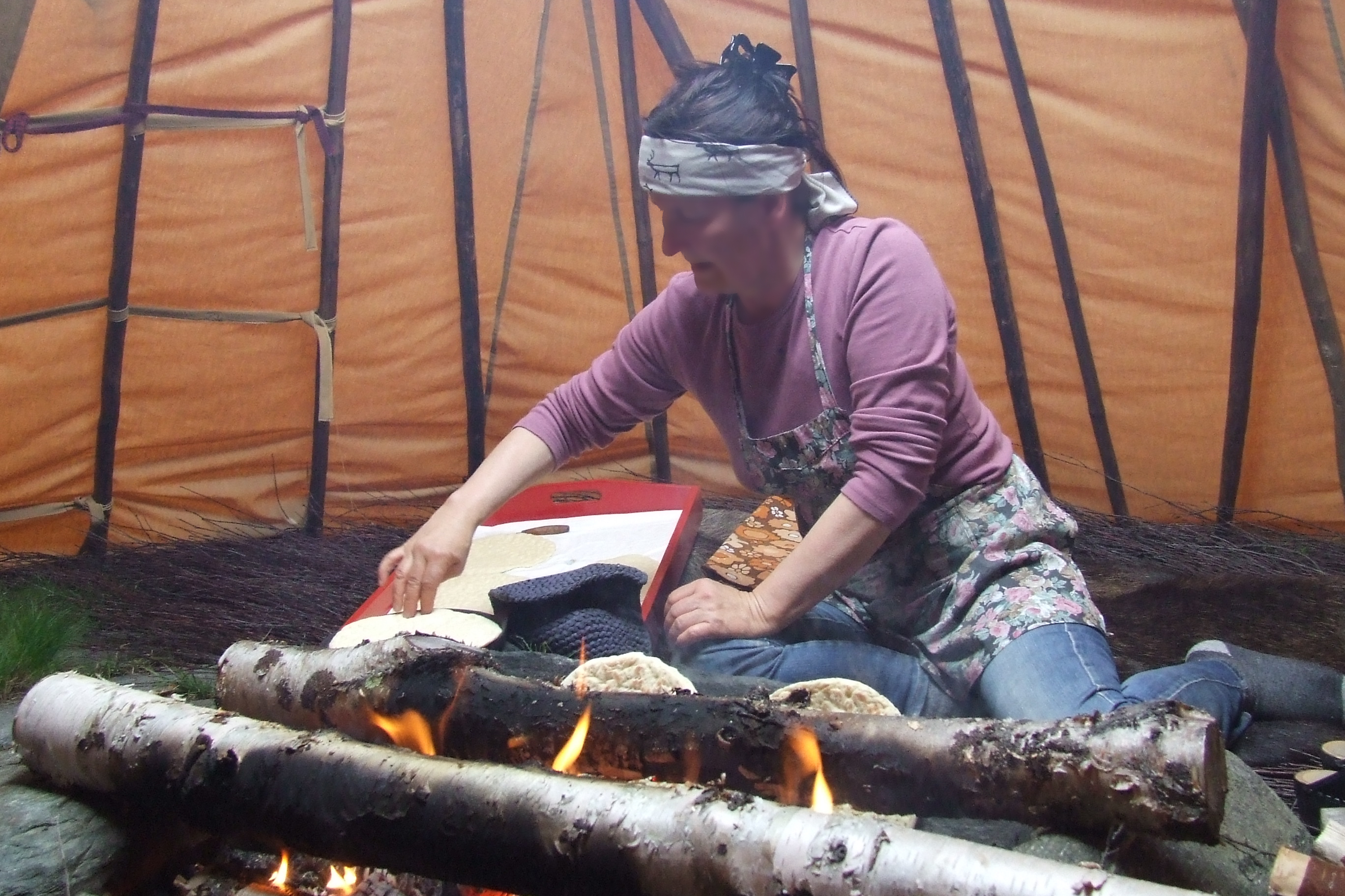 Sámi Frau der Sallohaure Sameviste backt Fladenbrot in einem Lávvu